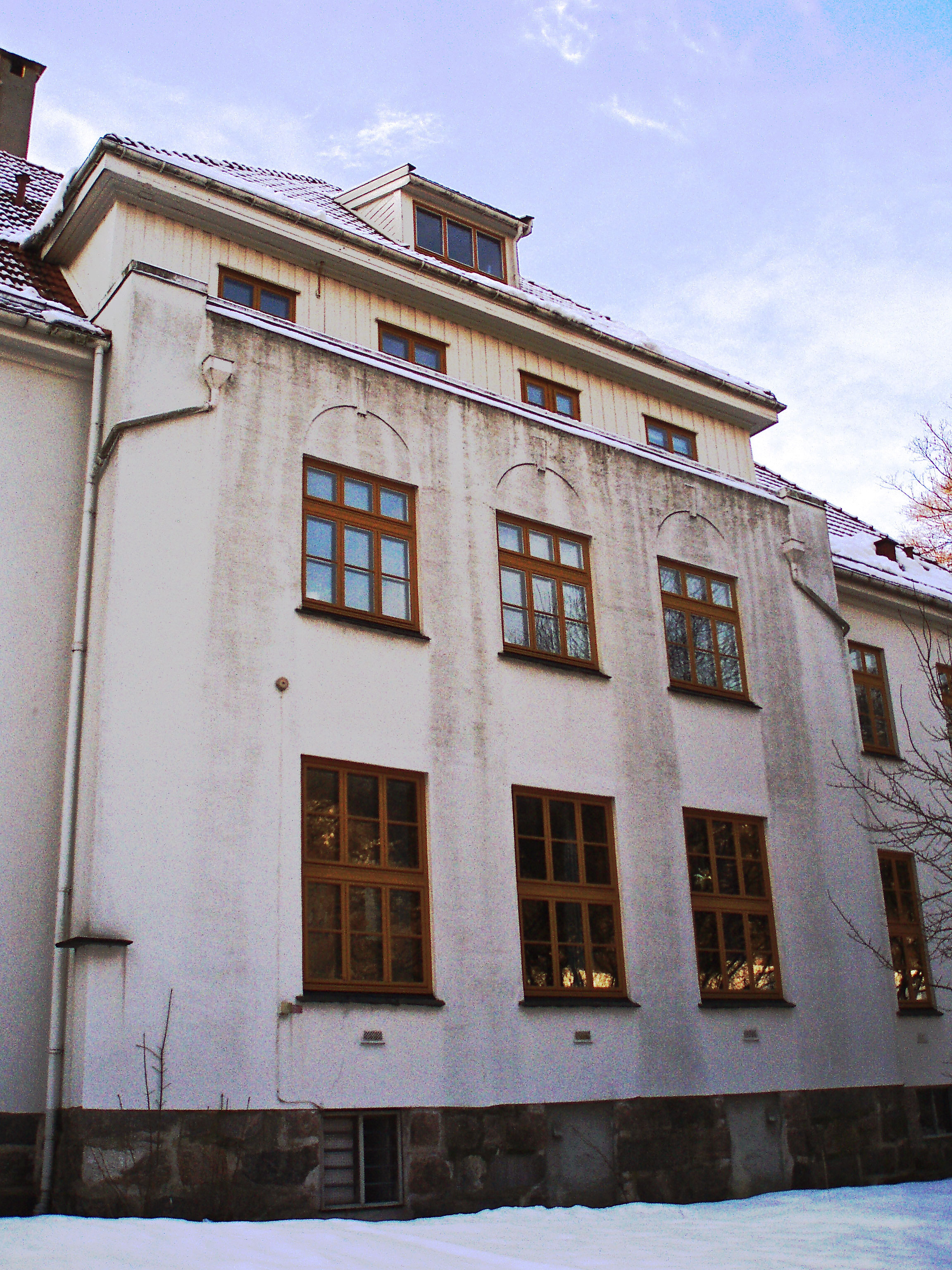 Detalj av barnehjemmets østside